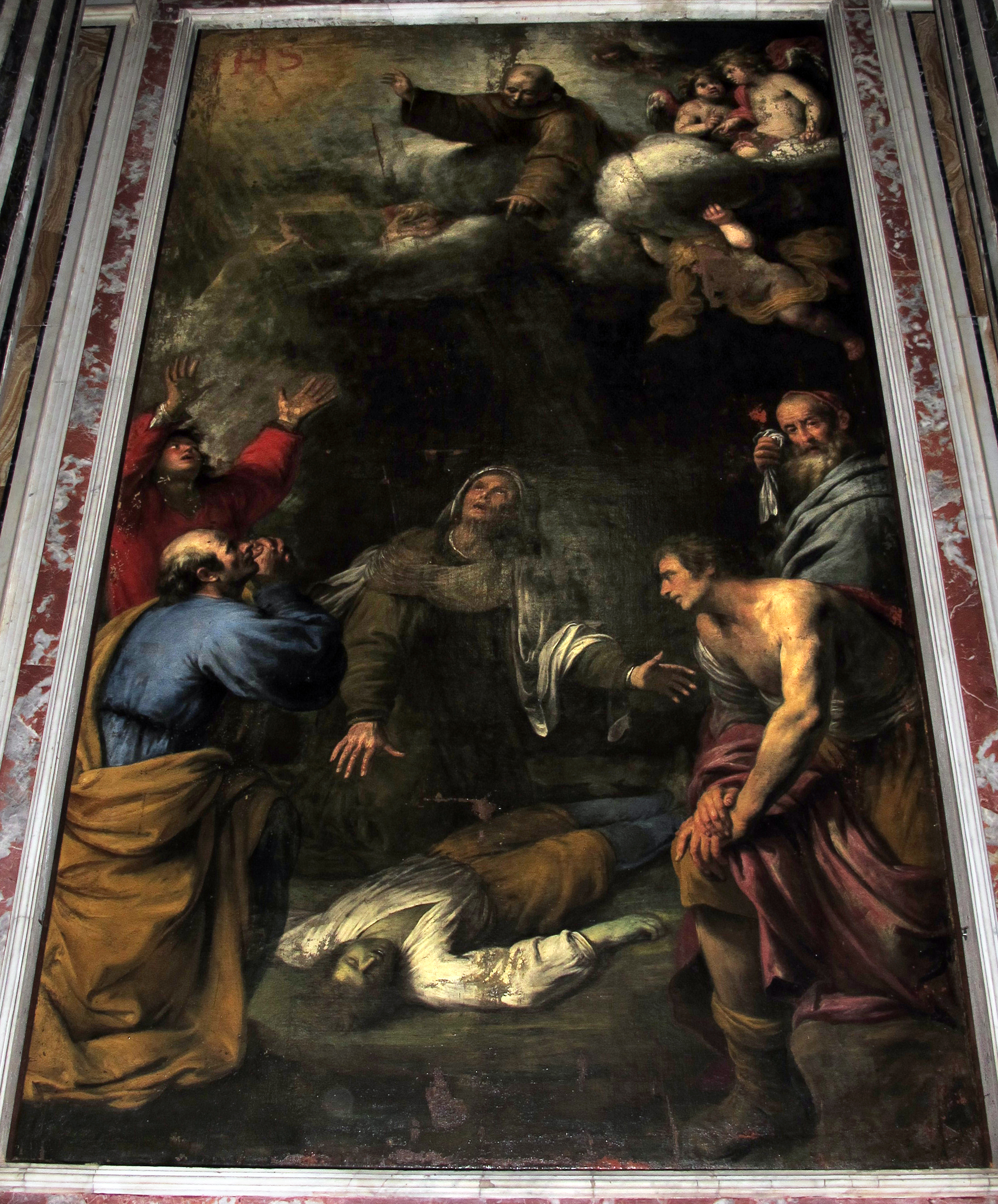 Genova, Liguria